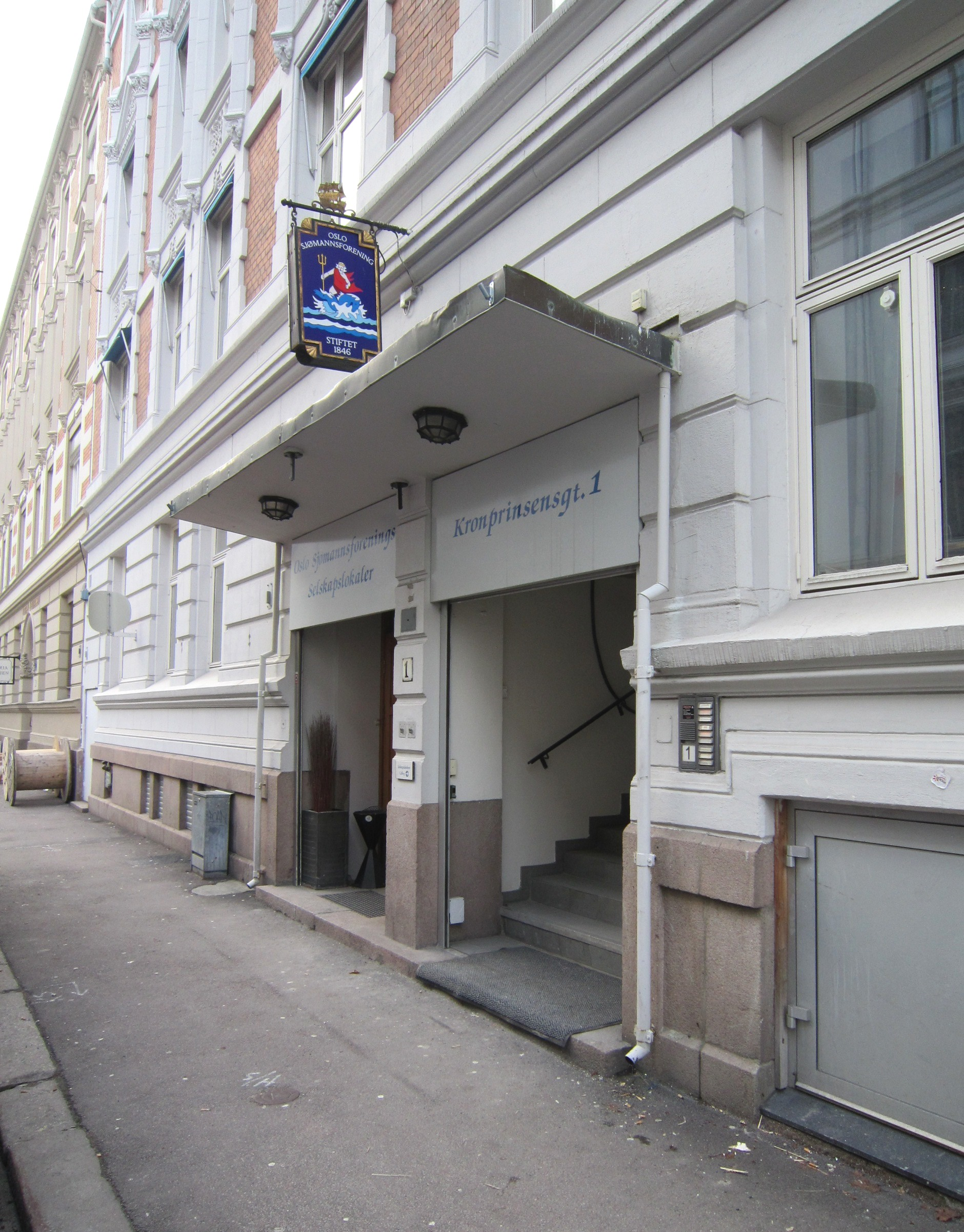 Oslo sjømannsforening i Kronprinsens gate 1. Arkitekt: Kristen Rivertz (1897).